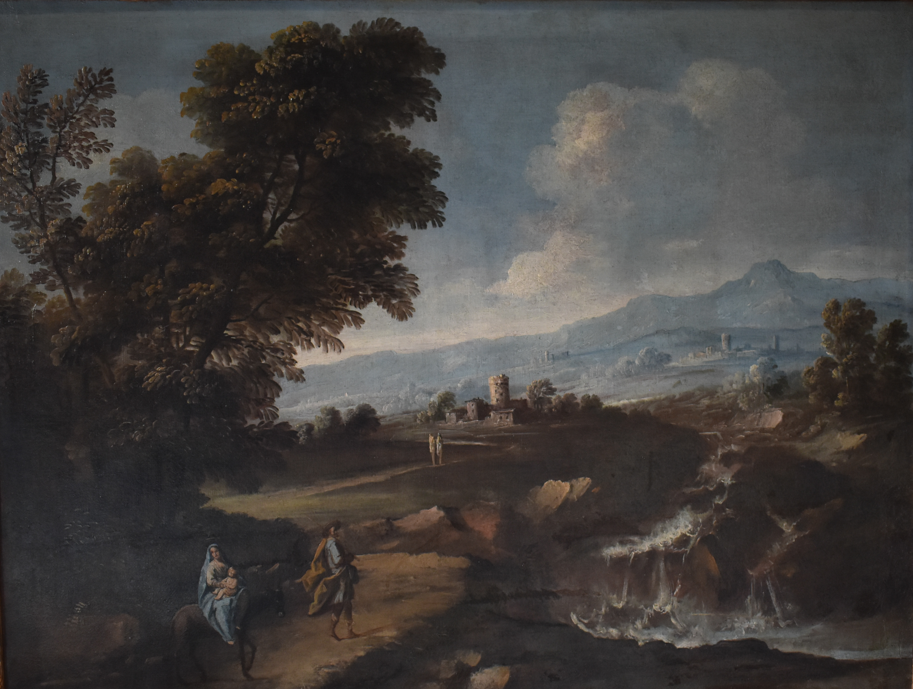 Giuseppe Zola, Paesaggio con cascata (Fuga in Egitto della Sacra Famiglia), olio su tela, 96x124 cm, Casa di Ludovico Ariosto, Ferrara This is a photo of a monument which is part of cultural heritage of Italy.